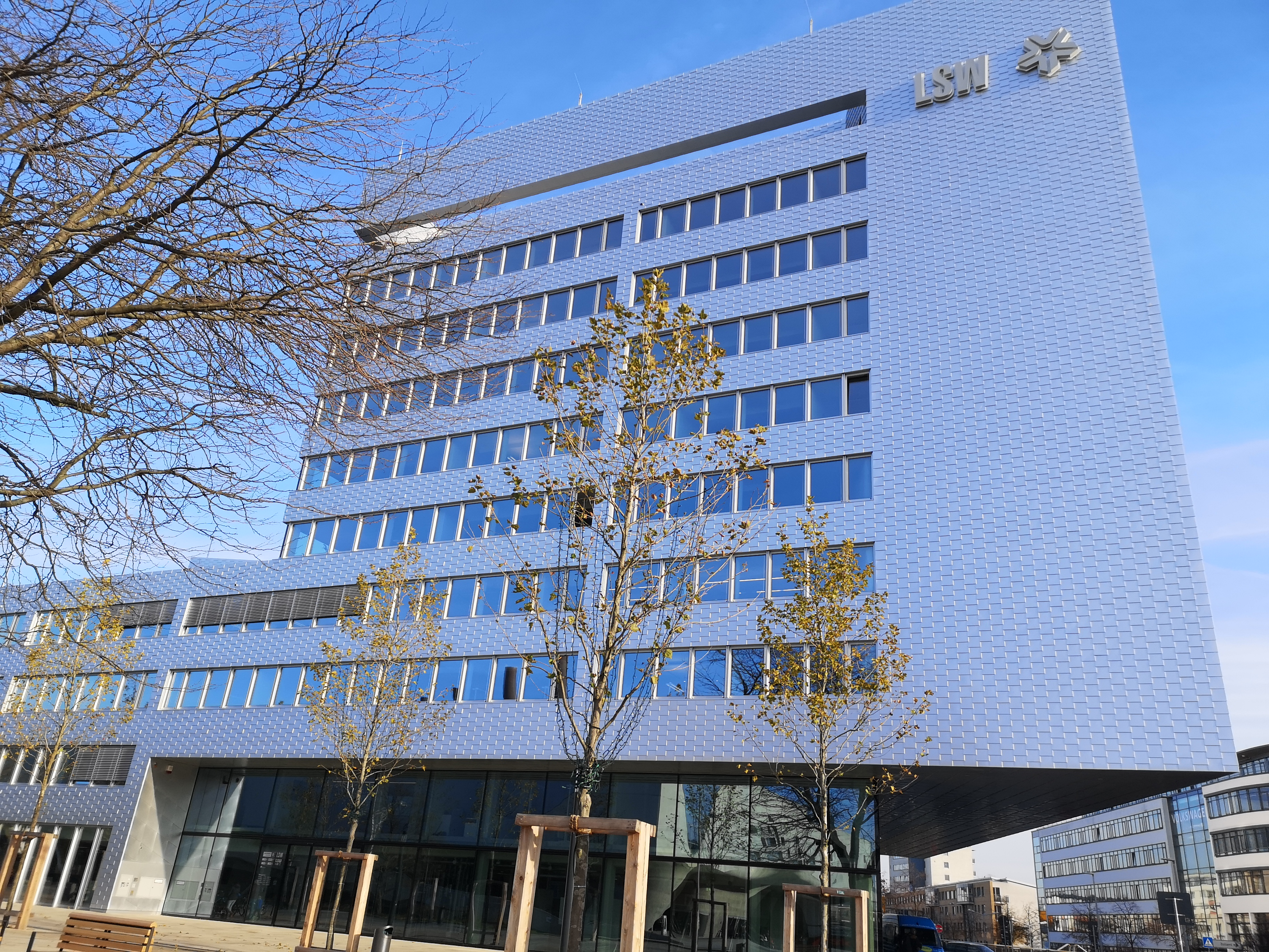 Das Bild zeigt den Nordkopf-Tower, die Heimat der Stadtwerke Wolfsburg.